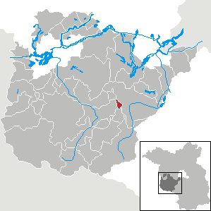 Borkheide in Brandenburg (Country) - District Potsdam-Mittelmark